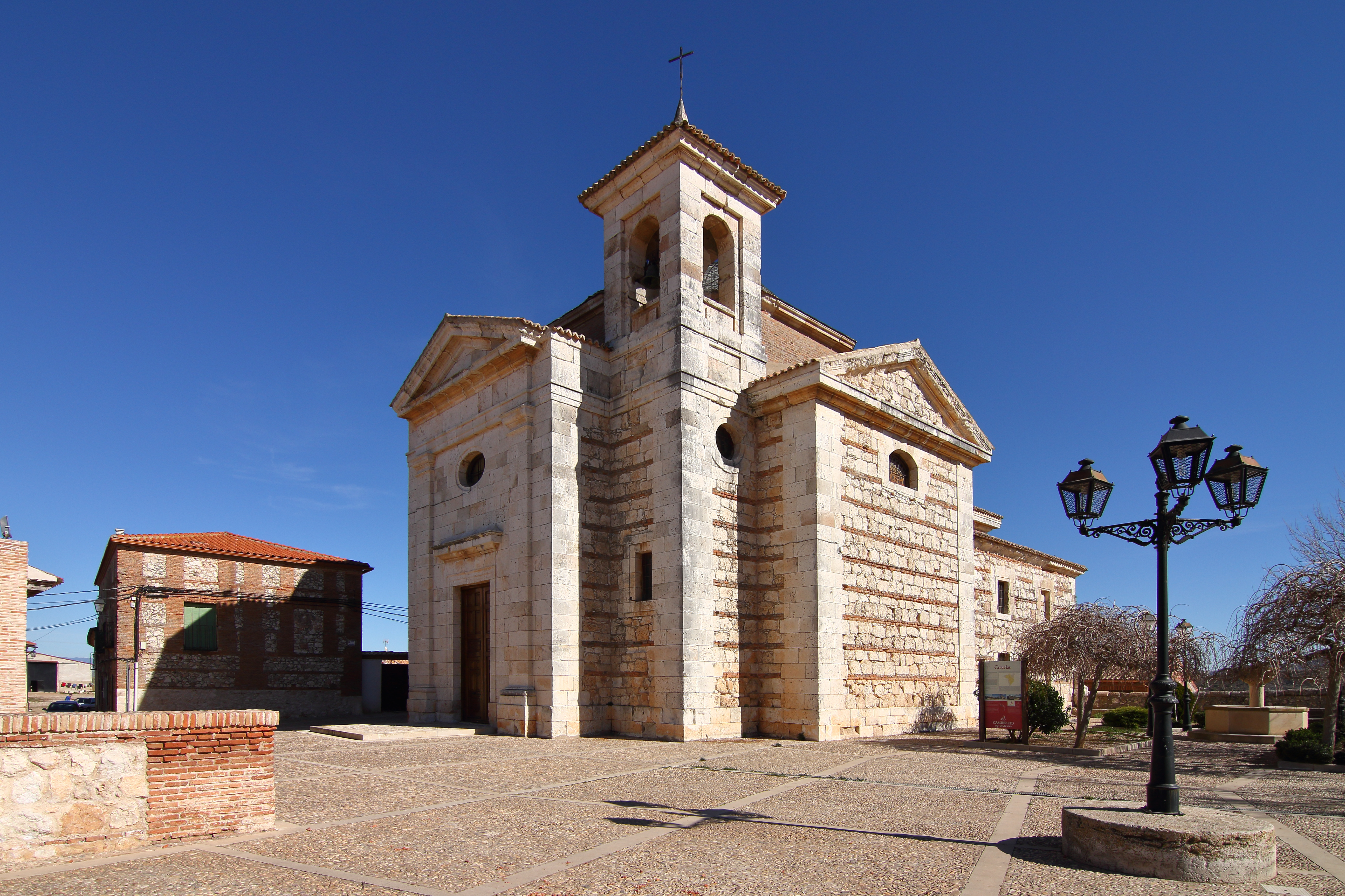 Ciruelas, Iglesia de San Pedro de Antioquía, fachada oeste y sur